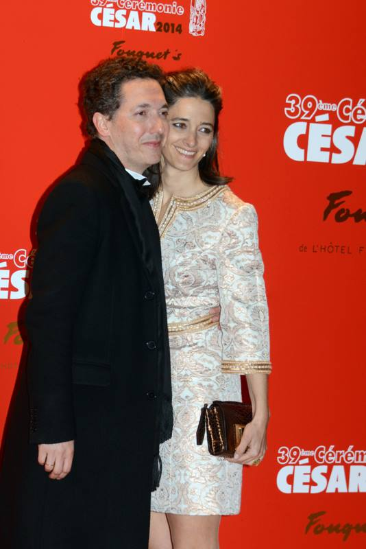 Guillaume Gallienne à la cérémonie des César